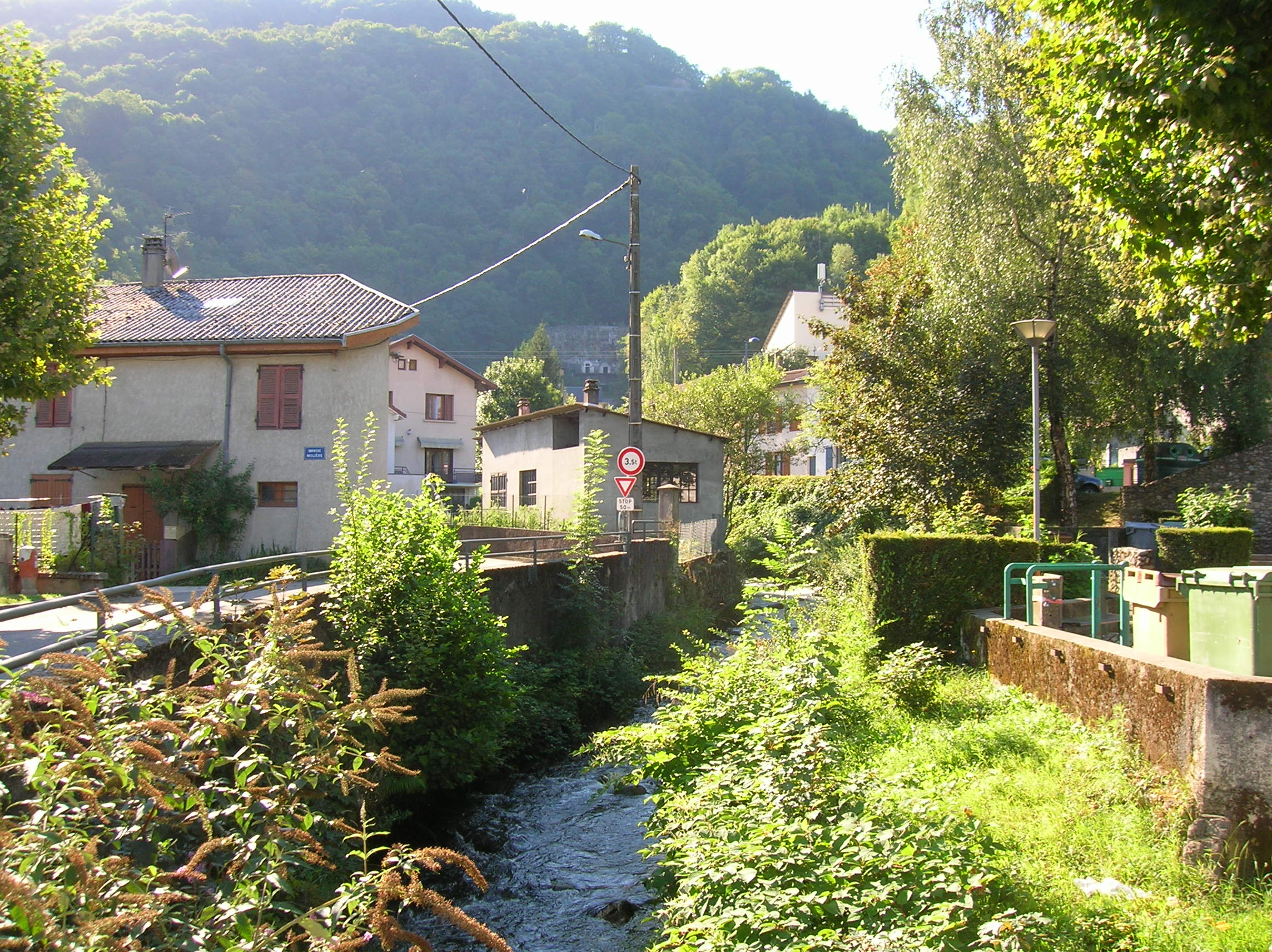 ruisseau de Laval, Brignoud, Villard-Bonnot, Isère, AuRA, France.